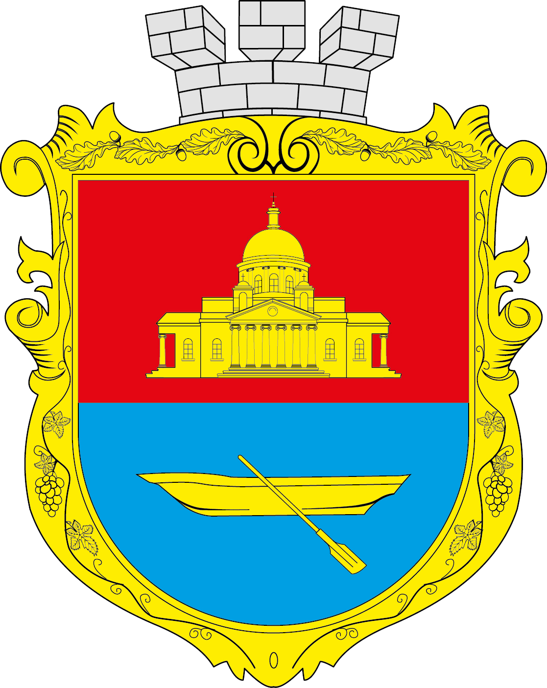 Герб Болграда